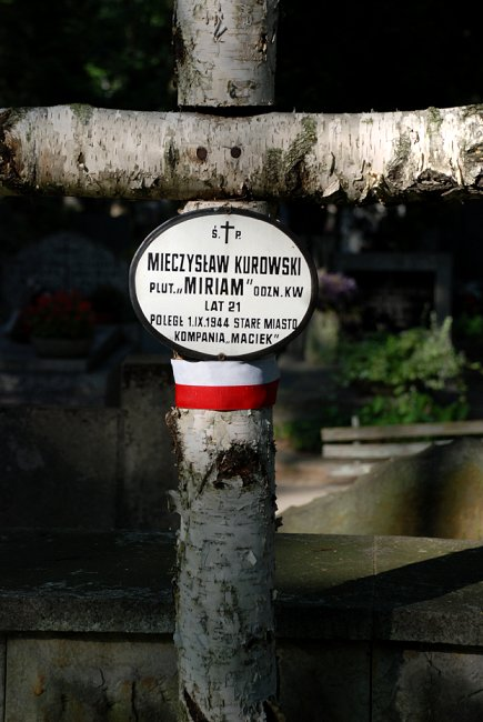 Nad grobem Mieczysława Kurowskiego na Powązkach Wojskowych w Warszawie